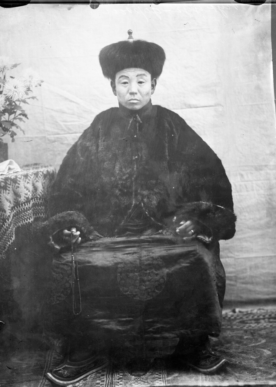 Монгол: Монгол Улсын Шадар сайд, Дотоод яамны тэргүүн сайд , нягт билэгт Дүйнхорын да лам , Бэйл Тогоочын Пунцагдорж (1877-1922)